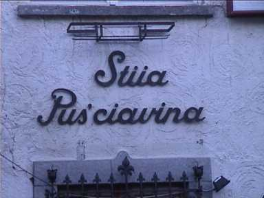 Restaurent sign in Lombard, in Poschiavo (GR), Switzerland